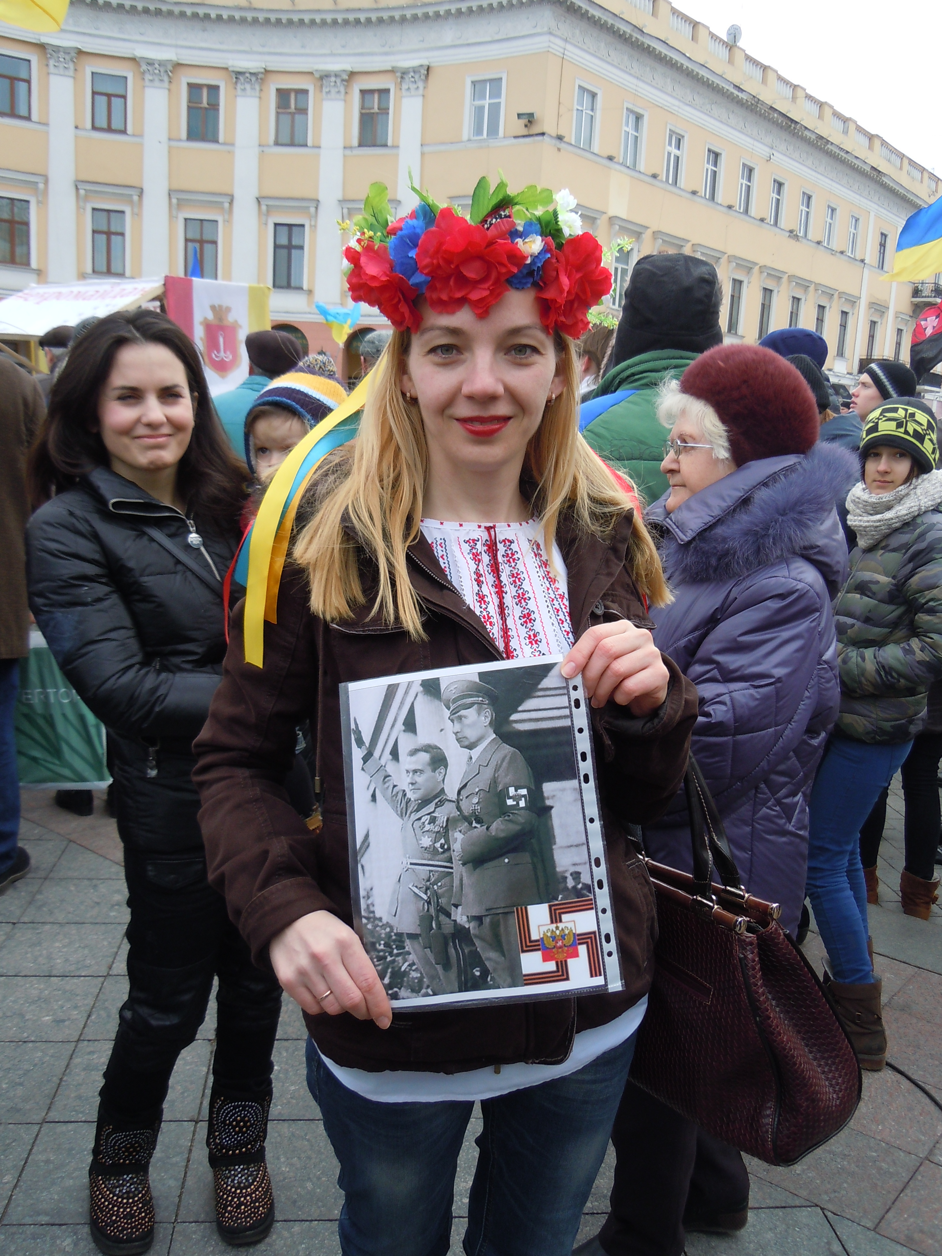 Антивоєнний протест в Одесі